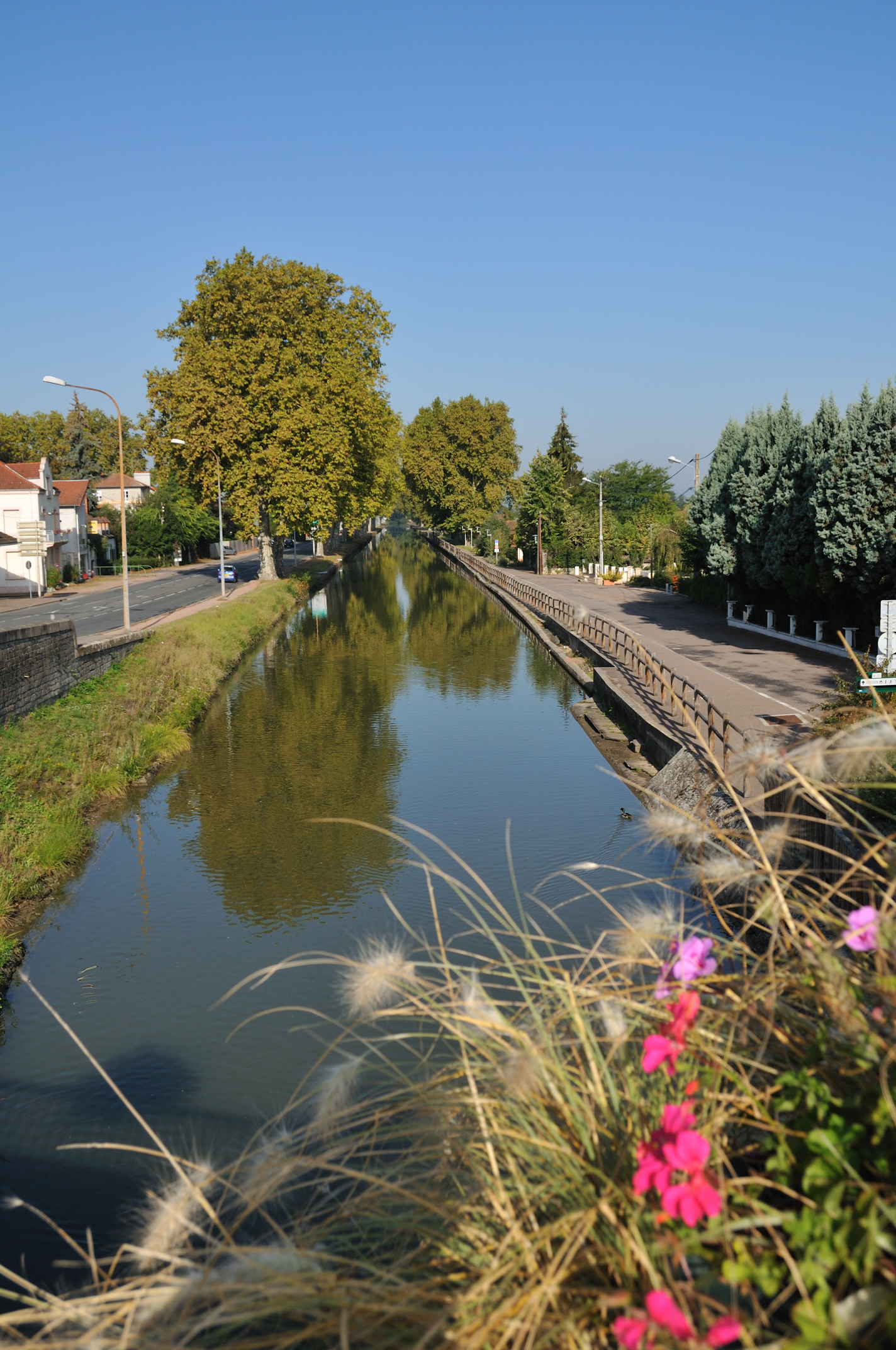 Canal du centre, Paray-le-Monial, Saône-et-Loire, France